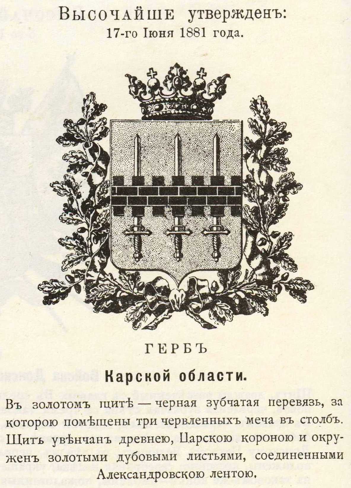 Official Russian Empire coat of arms Kars Oblast. Герб Российской Империи Карской области с официальным описанием в Гербовнике Винклера.